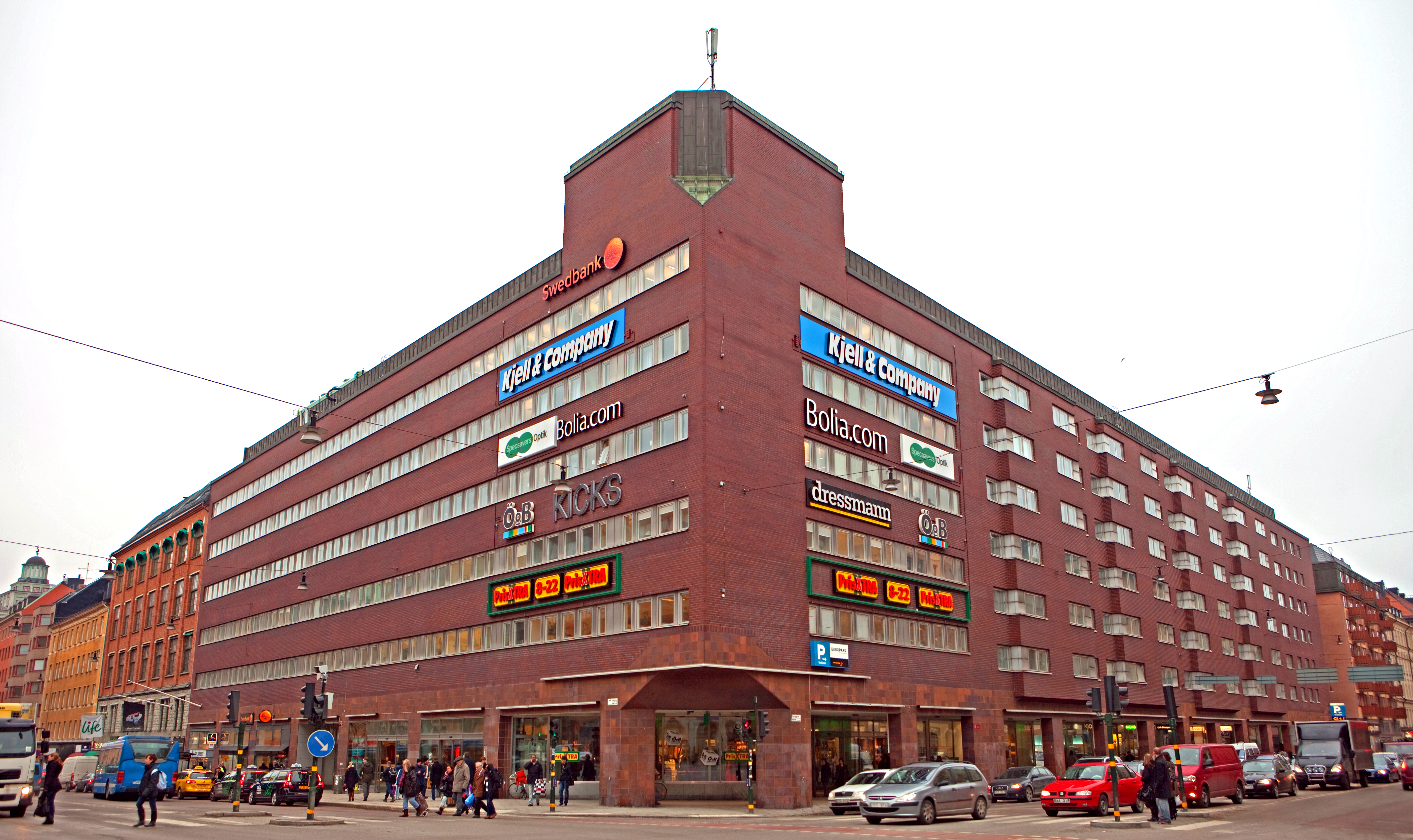 Roddaren 58, built 1972 - 1979 by Fastighets AB Hufvudstaden . Architect Per Borgström.